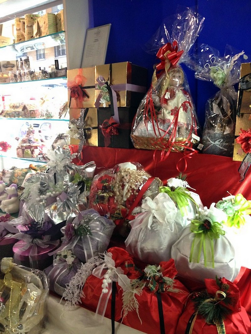 Vitrina natalizia con panettoni.